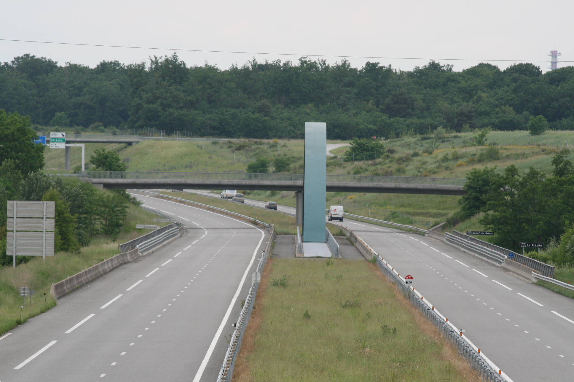 Viaduc de Briare - Pont Bowstring supportant l'autoroute A77 et franchissant le Canal de Briare et la Trézée - département du Loiret - France